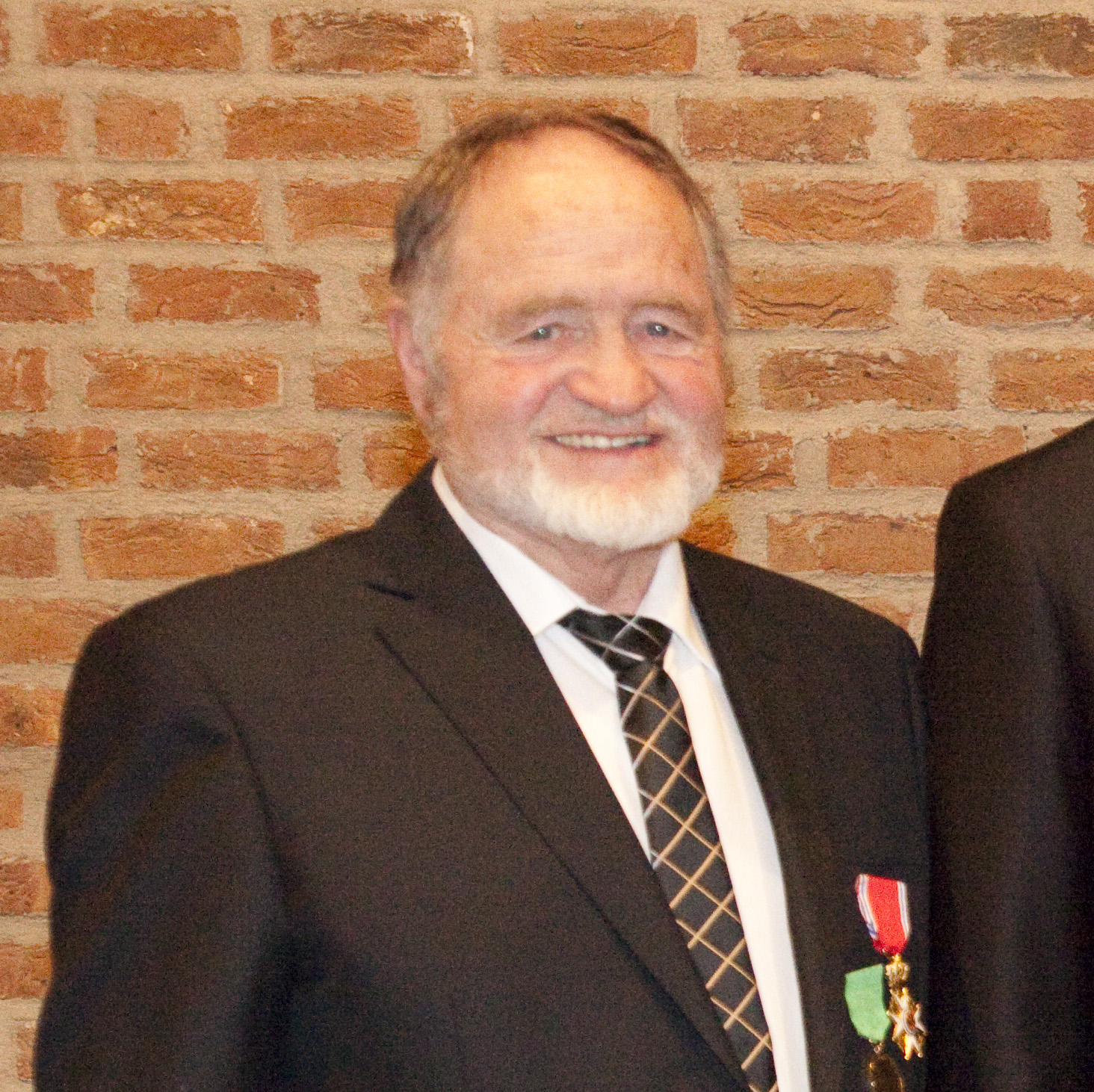 Jon Østeng Hov. Foto: Bruce Sampson / NTNU Vitenskapsmuseet.